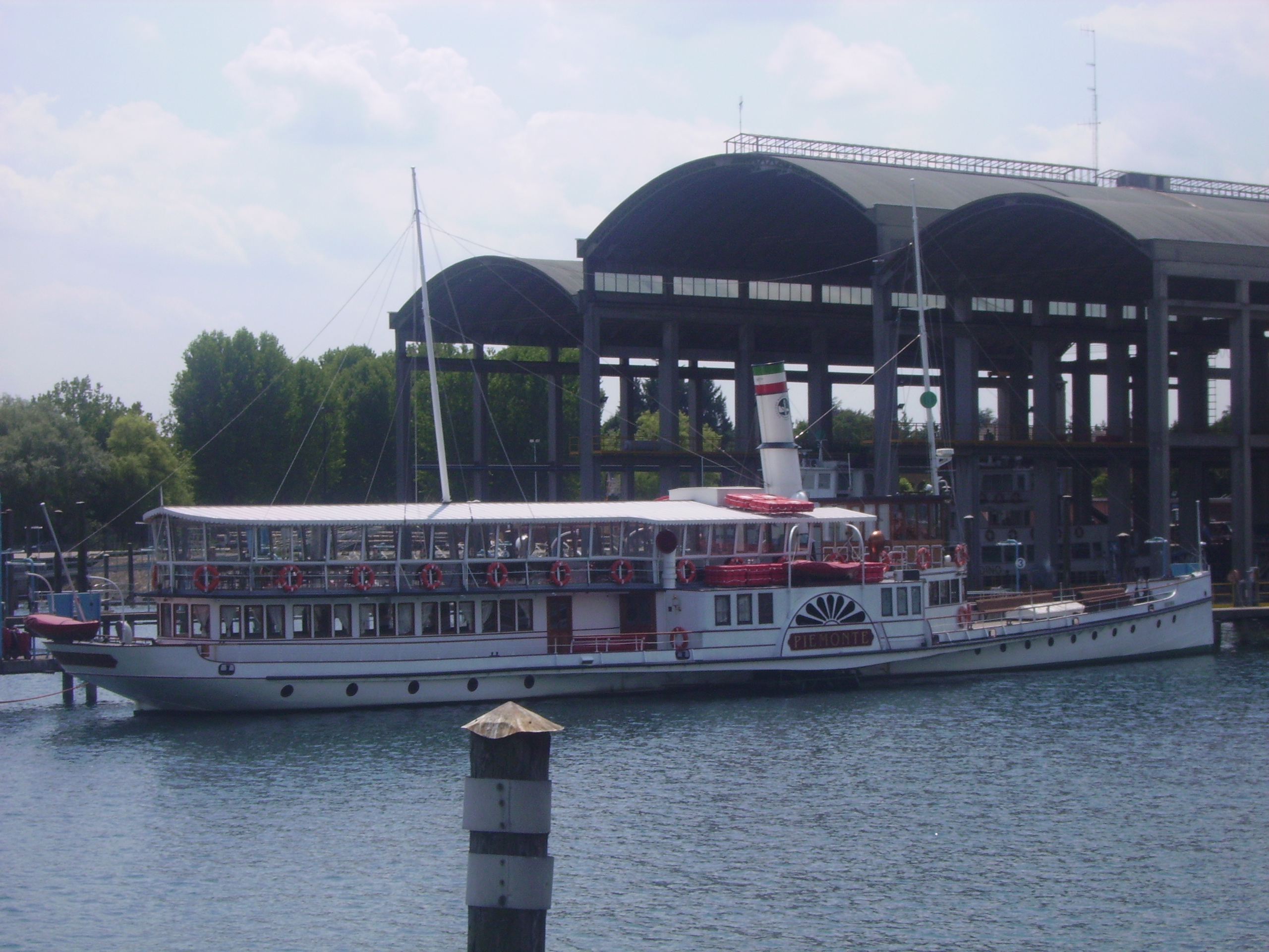 Piroscafo Piemonte in cantiere ad Arona